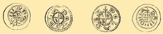 Béla I.- královské denáry